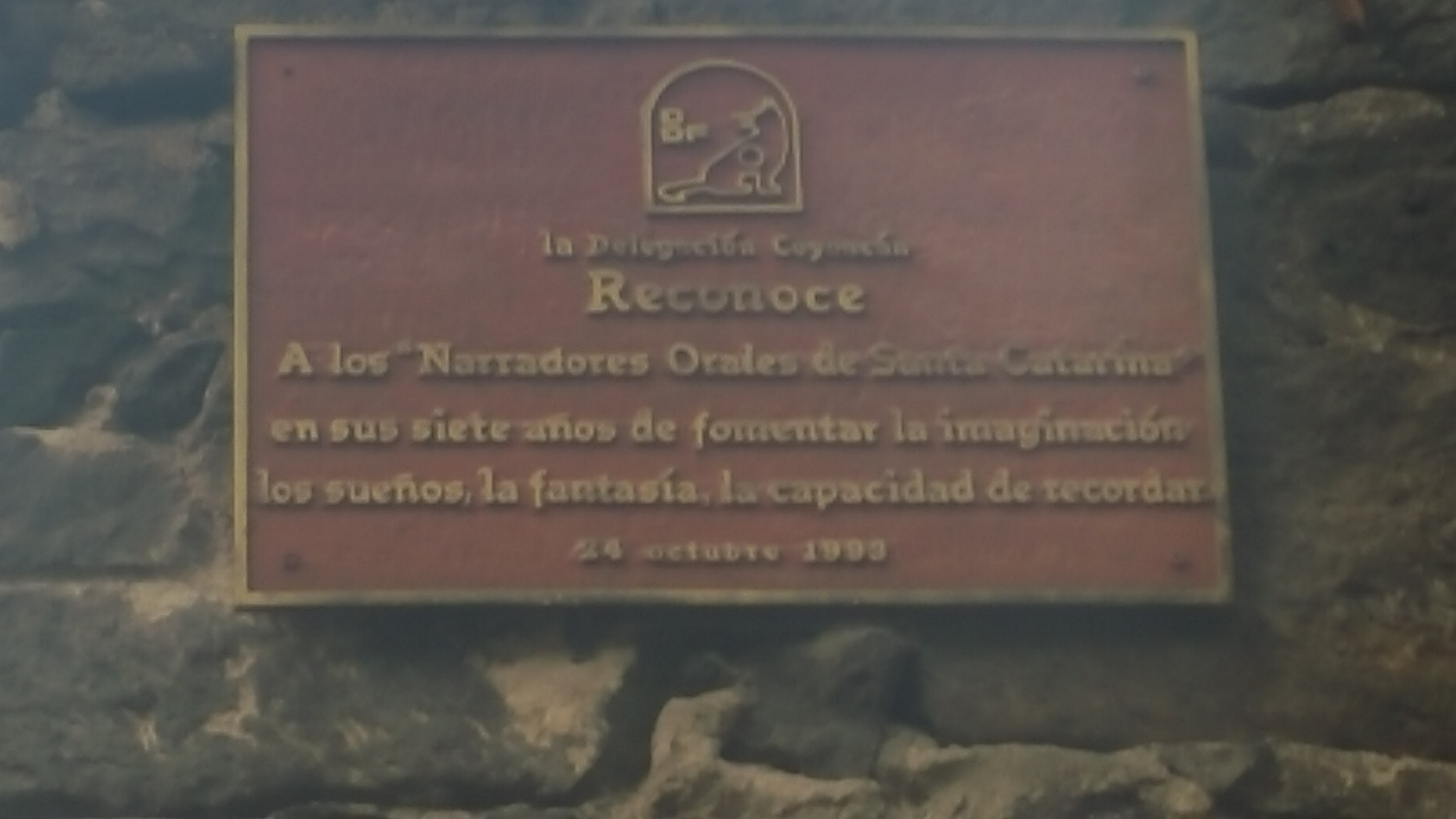 Placa de homenaje a los 7 sabios de Coyoacan, localizado en e, muro de Colindancia de la plaza con la "Republica de Guatemala ", develado en 1993.